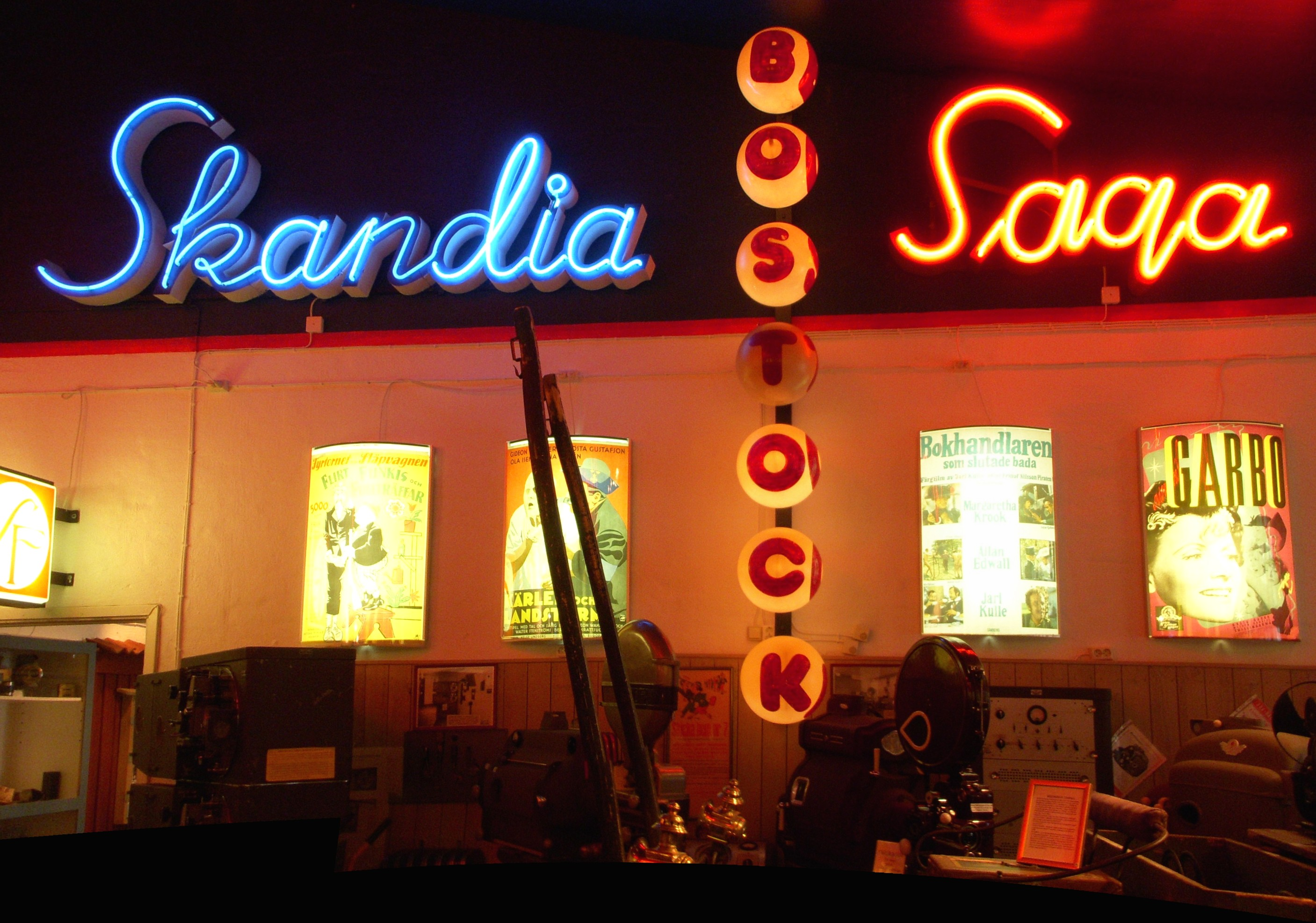 Biografmuseet i Säter, historiska biografskyltar